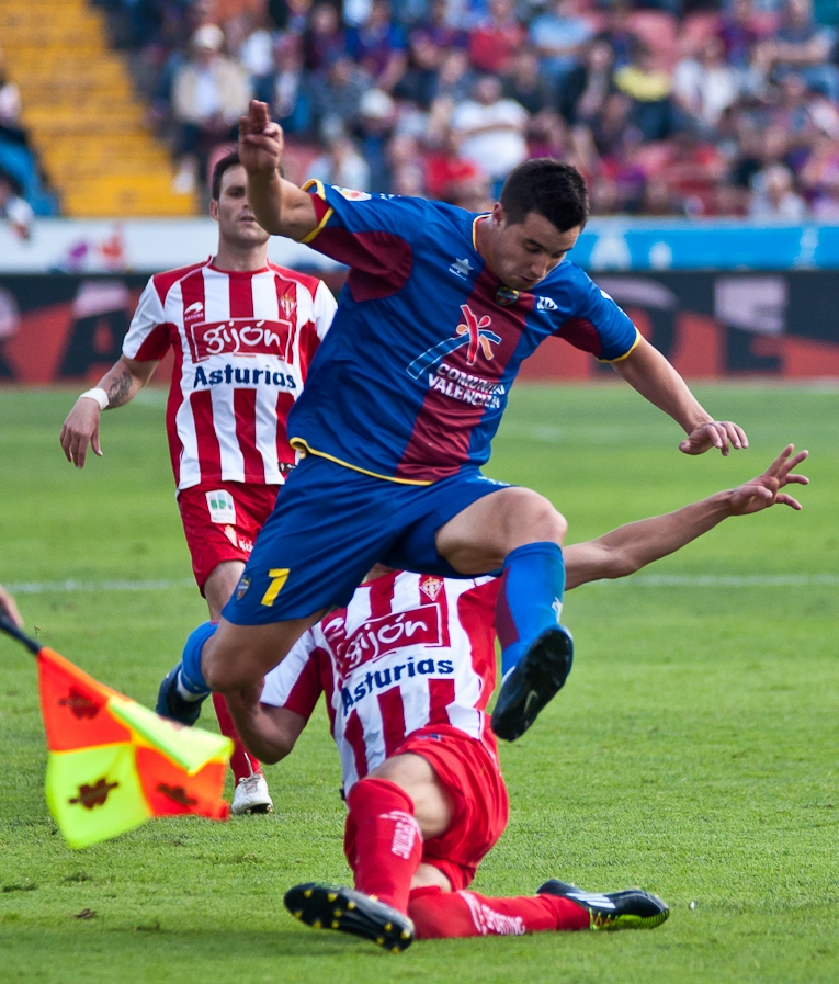 El jugador granota Xisco Nadal